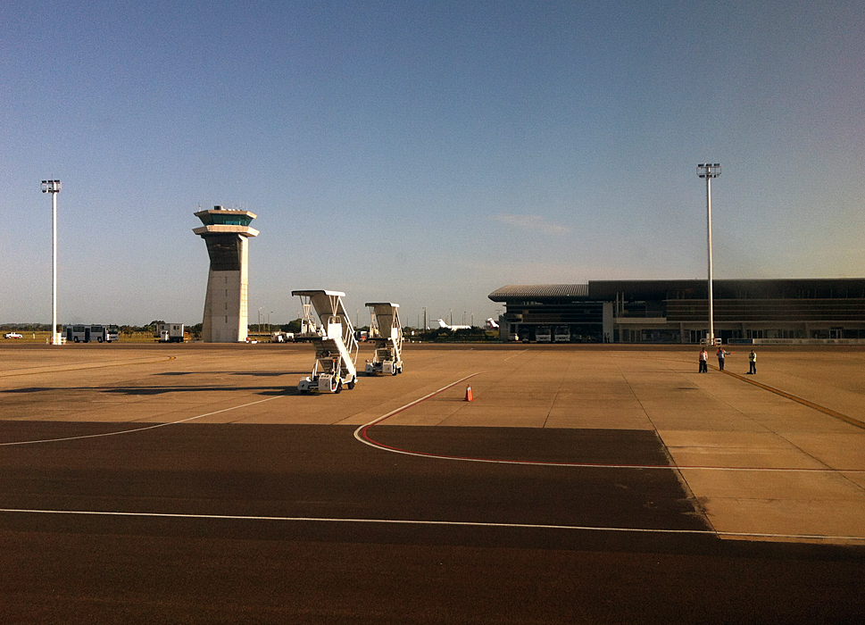 Der Flughafen Capitán de Corbeta Carlos A. Curbelo von Punta del Este, Uruguay